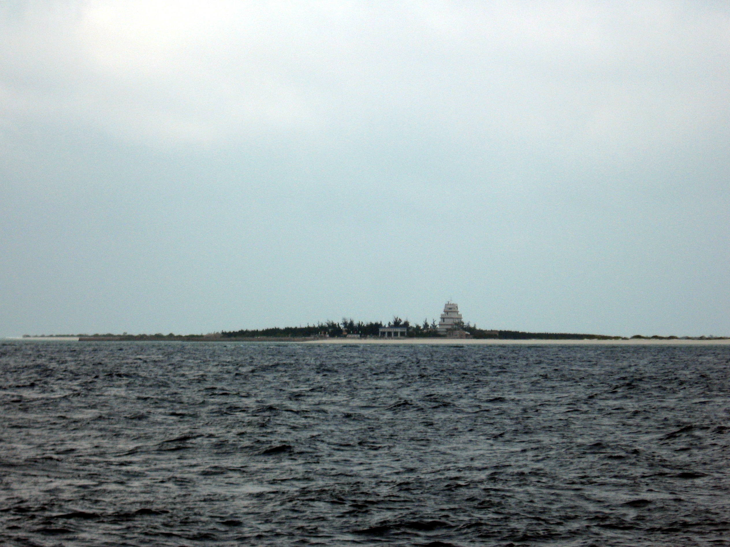 西沙中建岛